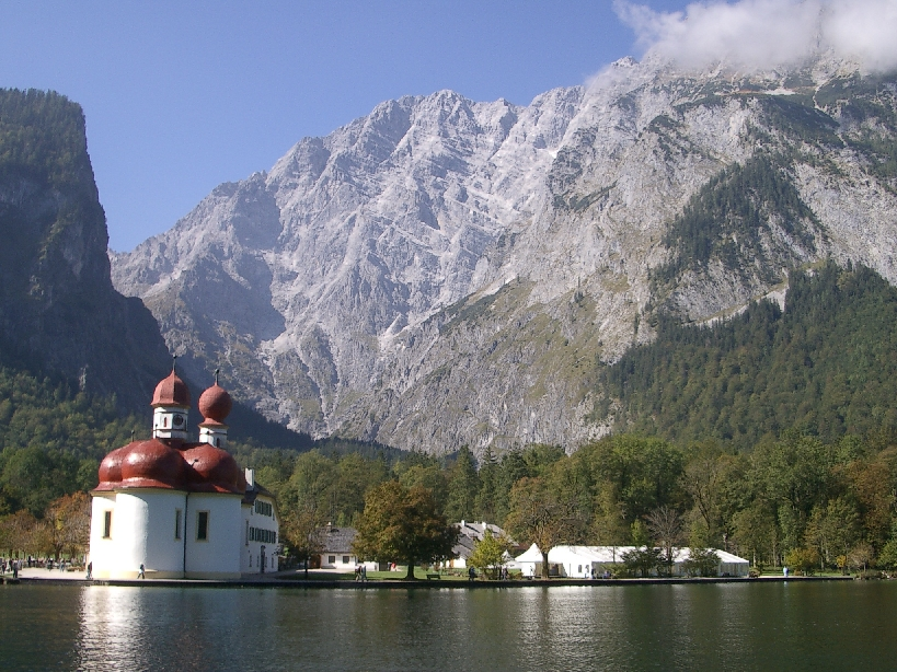 St. Bartholomä am Königssee. Im Hintergrund die Watzmann Ostwand.